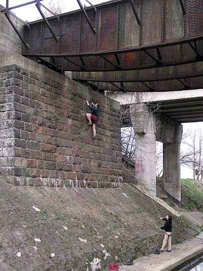 Wspinaczka z asekuracją na wędkę na nieczynnym moście kolejowym w Łodzi. Oświadczam, że jestem autorem zdjęcia i udzielam na nie licencji PD - Andrzej Makarczuk.